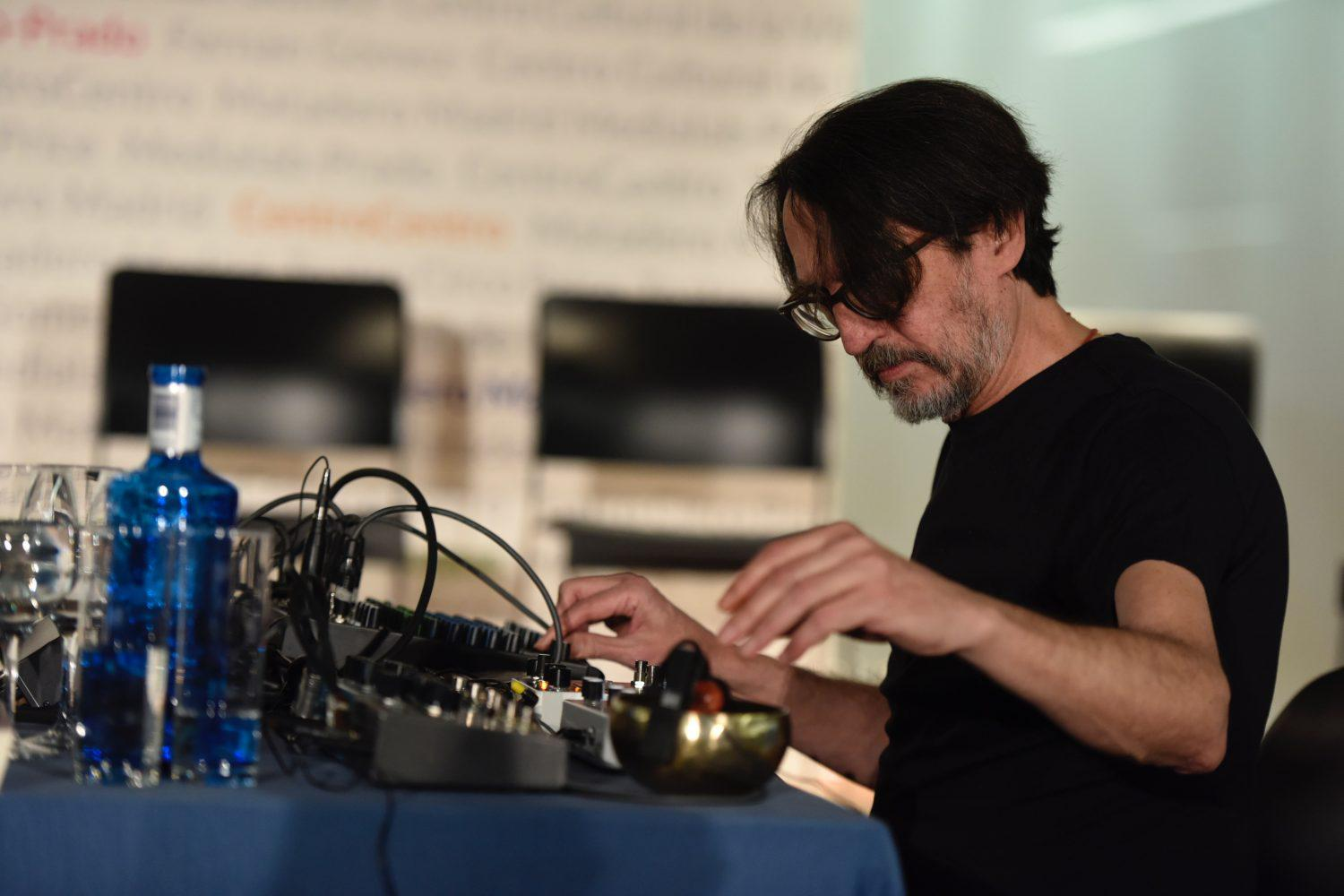 El Pabellón de los Jardines de Cecilio Rodríguez, en el Parque de El Retiro, ha sido el escenario para la presentación de las nuevas direcciones de seis grandes centros culturales municipales. La alcaldesa de Madrid, Manuela Carmena, les ha dado la bienvenida a la ciudad. La música del productor y músico Suso Saiz, y las palabras del novelista y poeta Benjamín Prado, les han acompañado en este encuentro.